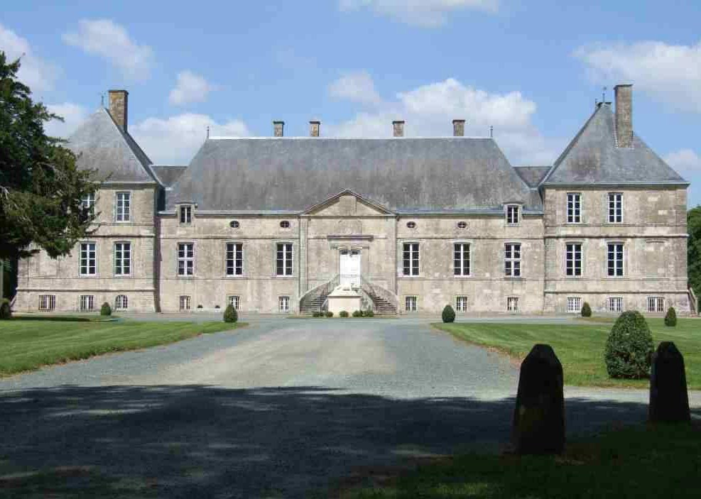 St Michel le Cloucq - Château de la Baugisière (site internet